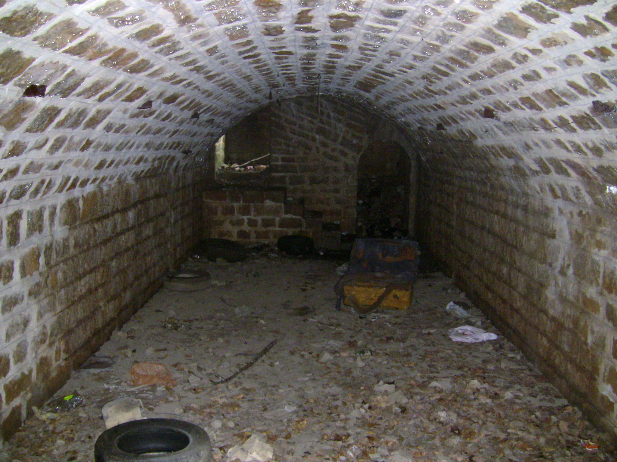 Batterie annexe nord-est du fort de Planoise, à Besançon (Doubs, France)